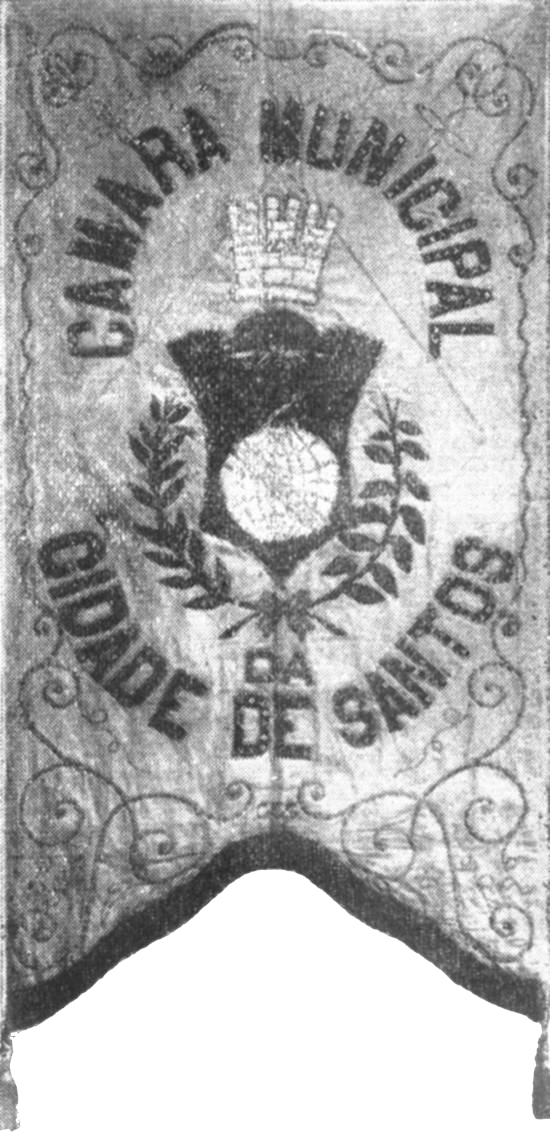 O antigo estandarte da Câmara Municipal de Santos, confeccionado em 1888 e que serviu até o advento da República.